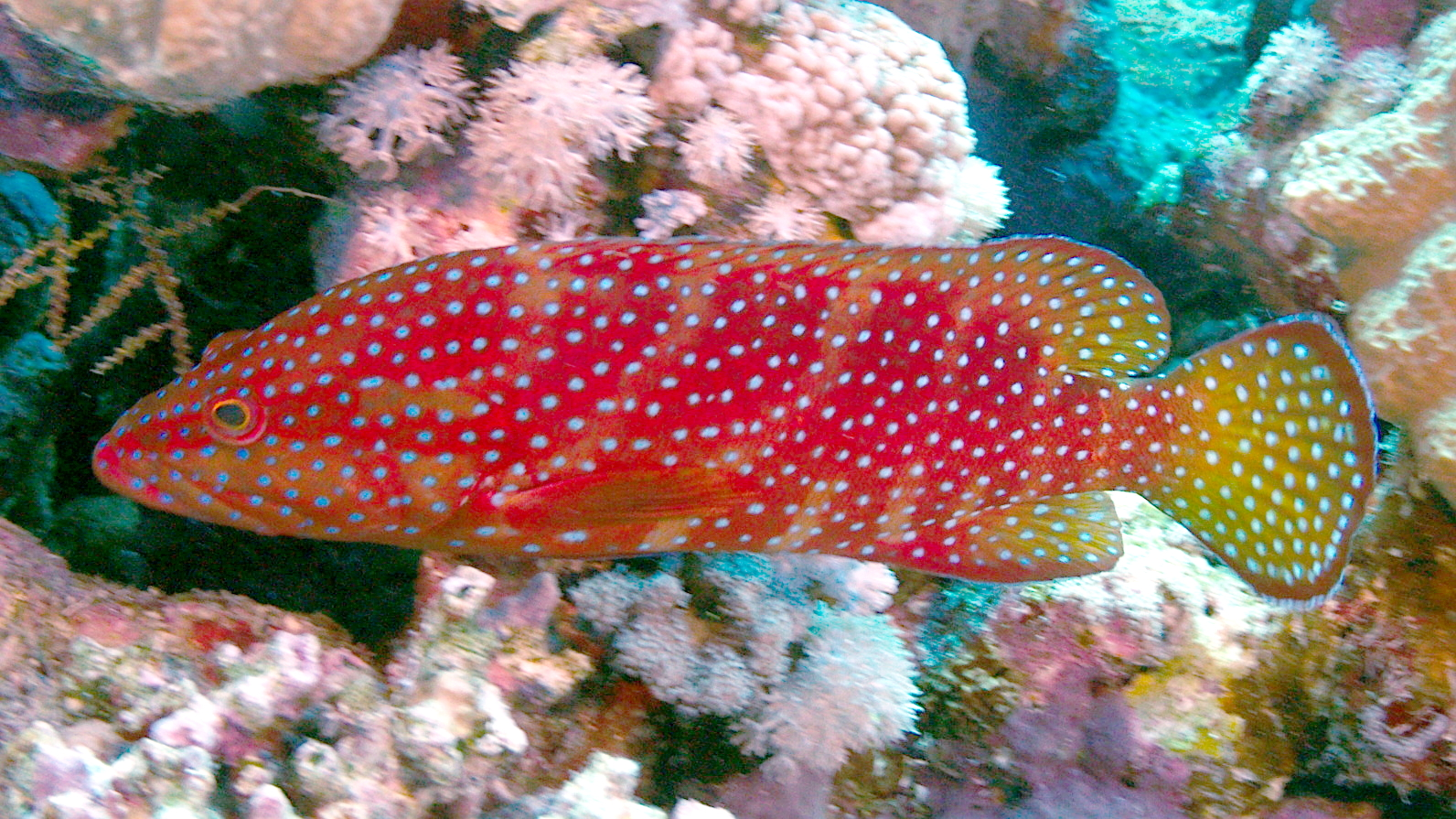 Photo d'un mérou de mer rouge caractérisé par les tâches de couleurs et la forme de la nageoire caudale